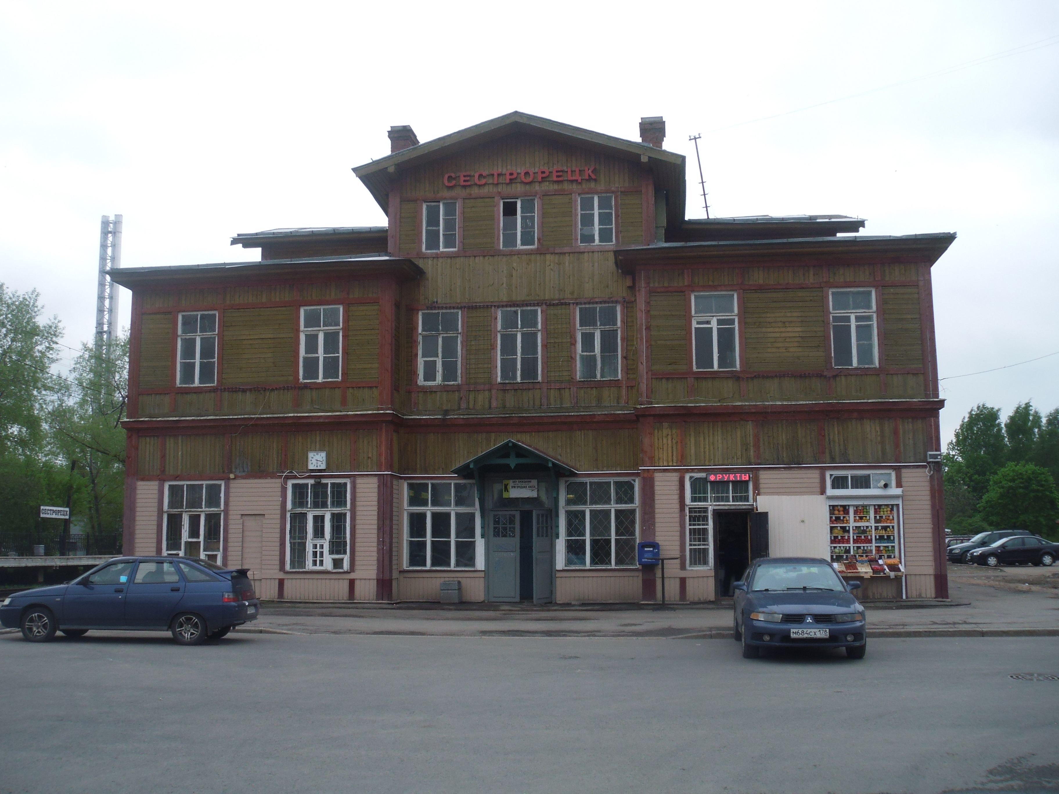 Сестрорецк СПб. Вокзал. Главный фасад, без ларьков и реклам в мае 2013 года